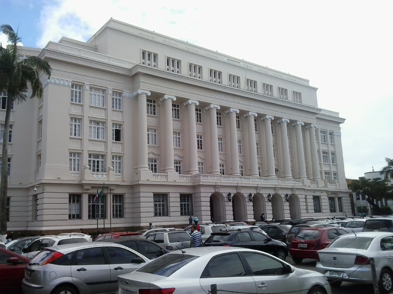 Fachada do Fórum Ruy Barbosa, no Largo do Campo da Pólvora, em Salvador.